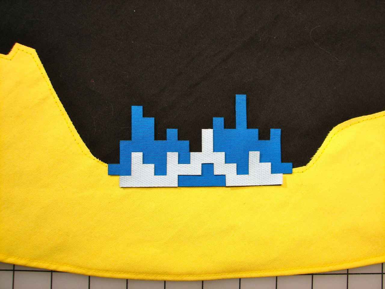 Missile Command Skirt